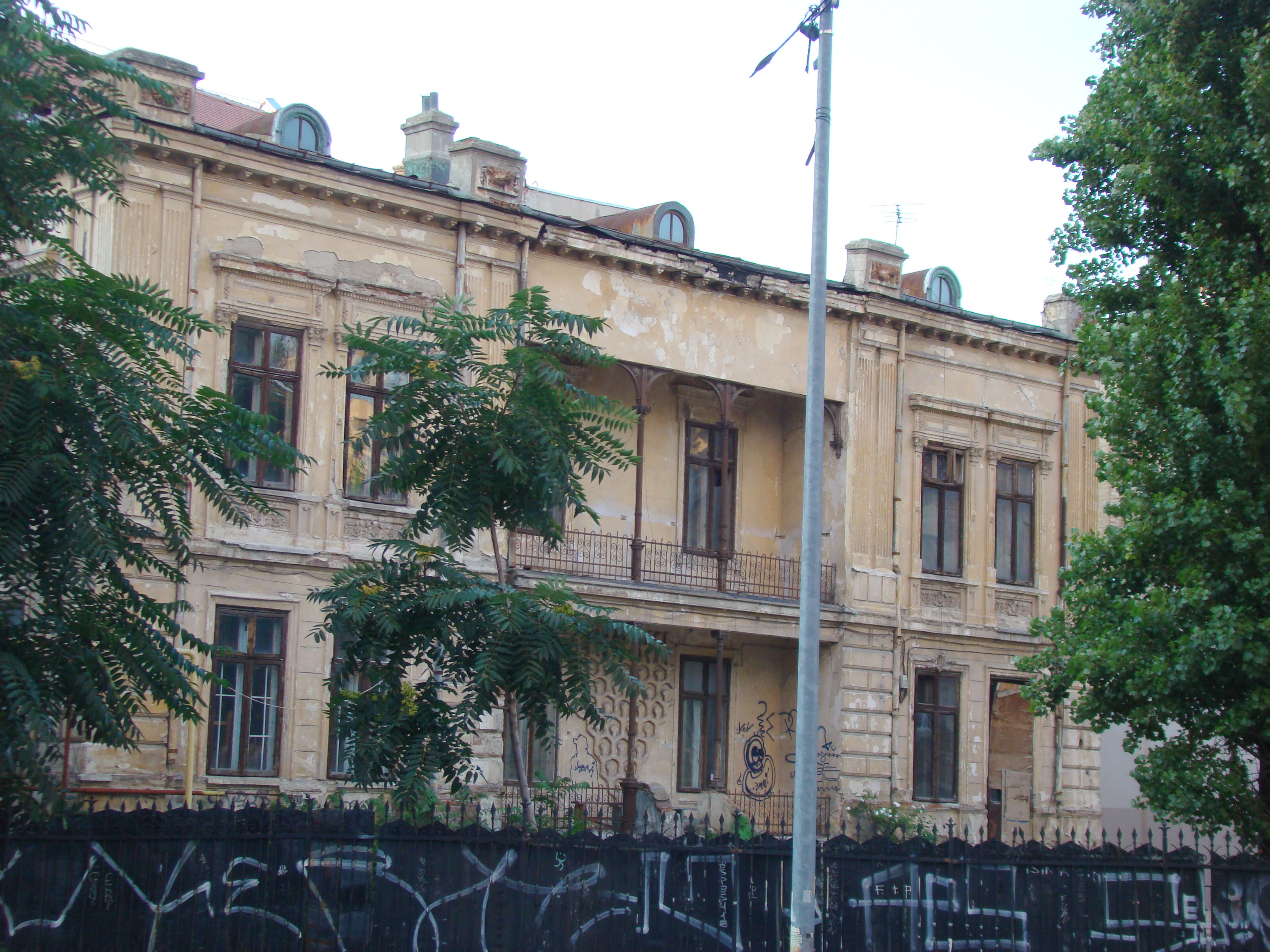 Casă monument istoric, str.Berthelot, nr.12 (Casa Robescu)